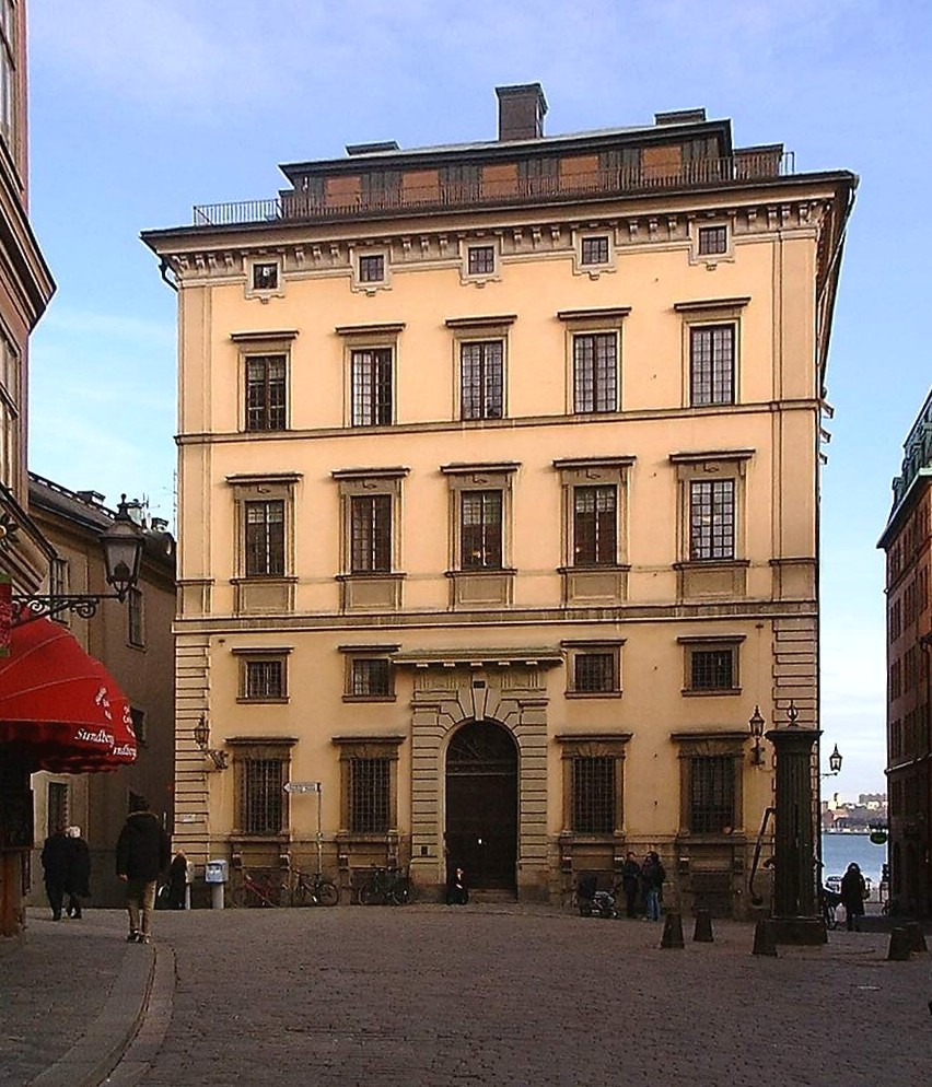 Façade of Södra Bankohuset at Järntorget, Gamla stan, Stockholm.